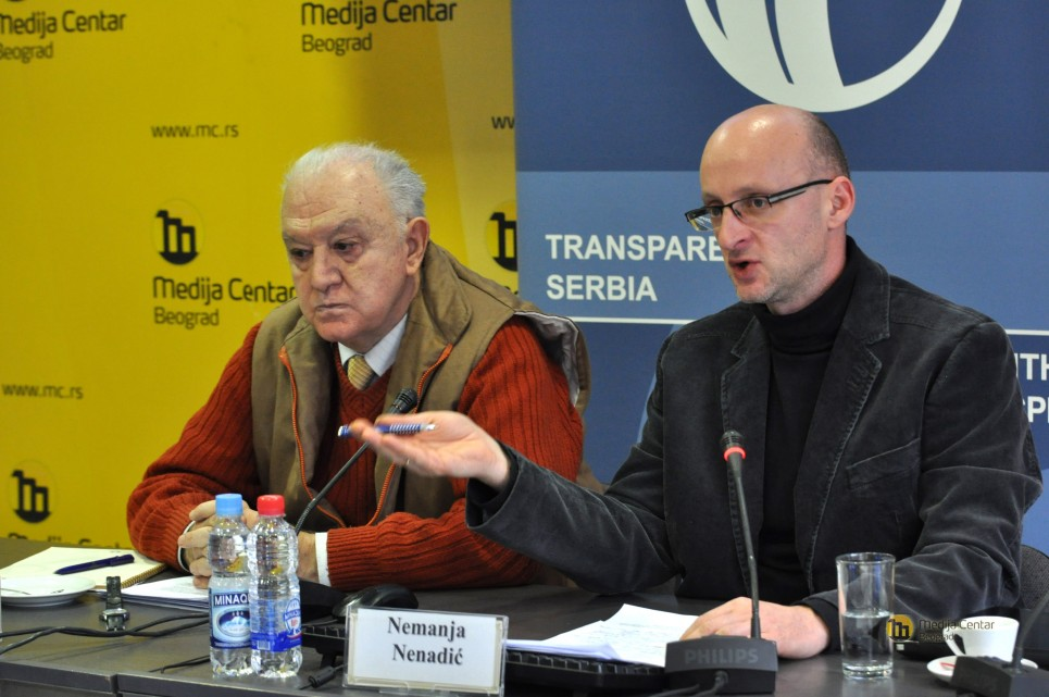 Српски (ћирилица): Председник ТС Владимир Гоати и програмски директор Немања Ненадић